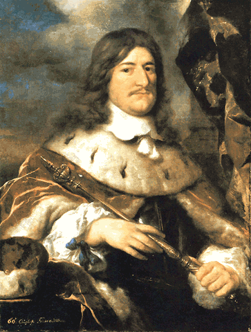 Friedrich Wilhelm von Brandenburg, der Große Kurfürst im Harnisch und Kurmantel.